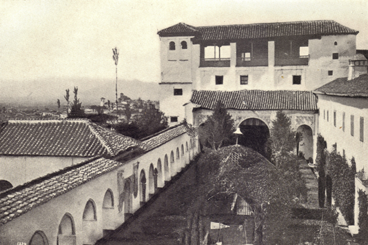 Generalife